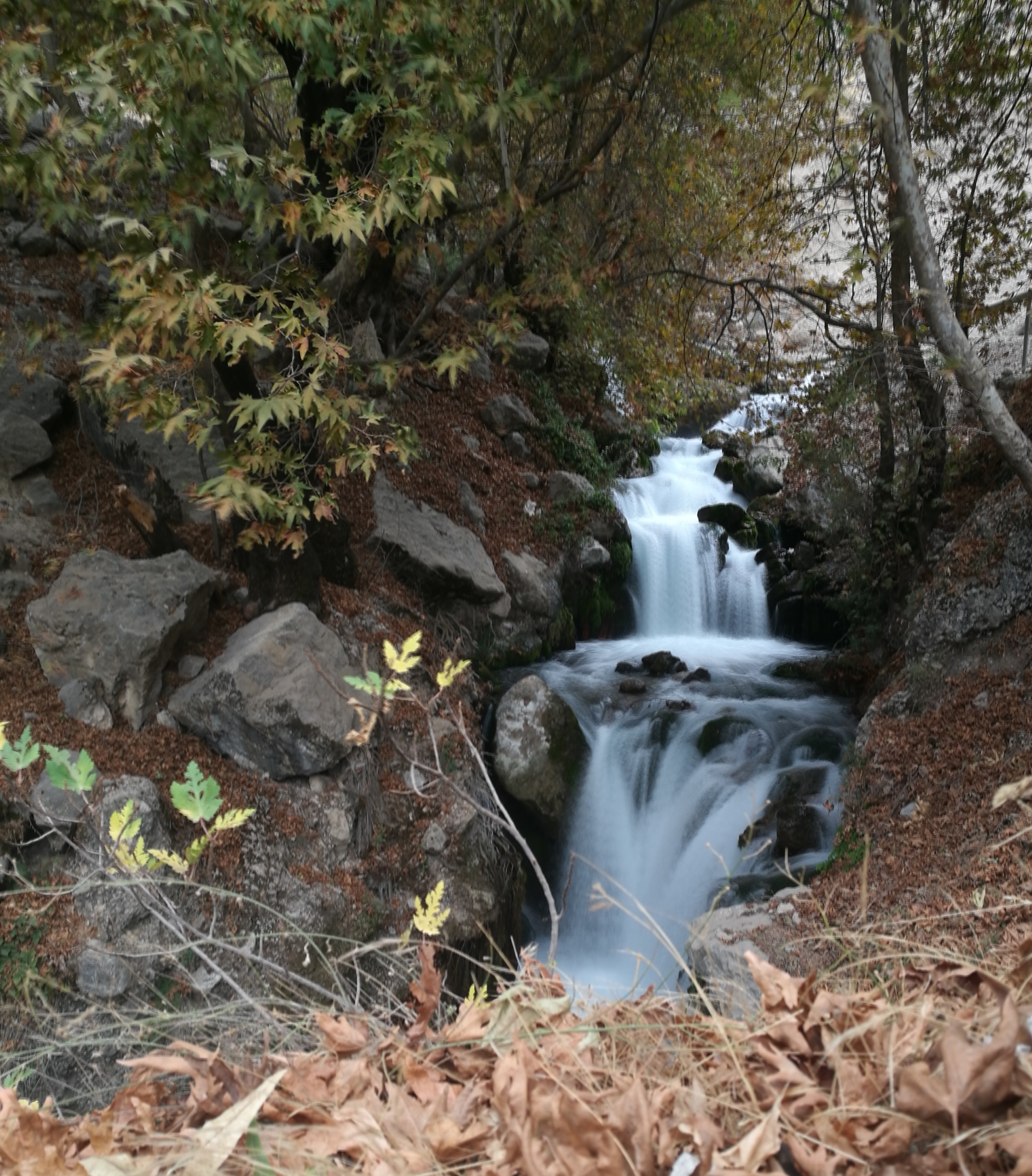 شیوند، روستایی از حوالی ایذه، خوزستان است که در منطقه حفاظت‌شده شالو و منگشت واقع شده‌است. این روستا از شرق به کارون می‌رسد و راه دسترسی به آن فقط از طریق دوبه است. آبشار شیوند که از جاذبه‌های گردشگری استان خوزستان است در فاصلهٔ ۴ کیلومتری این روستا قرار دارد.